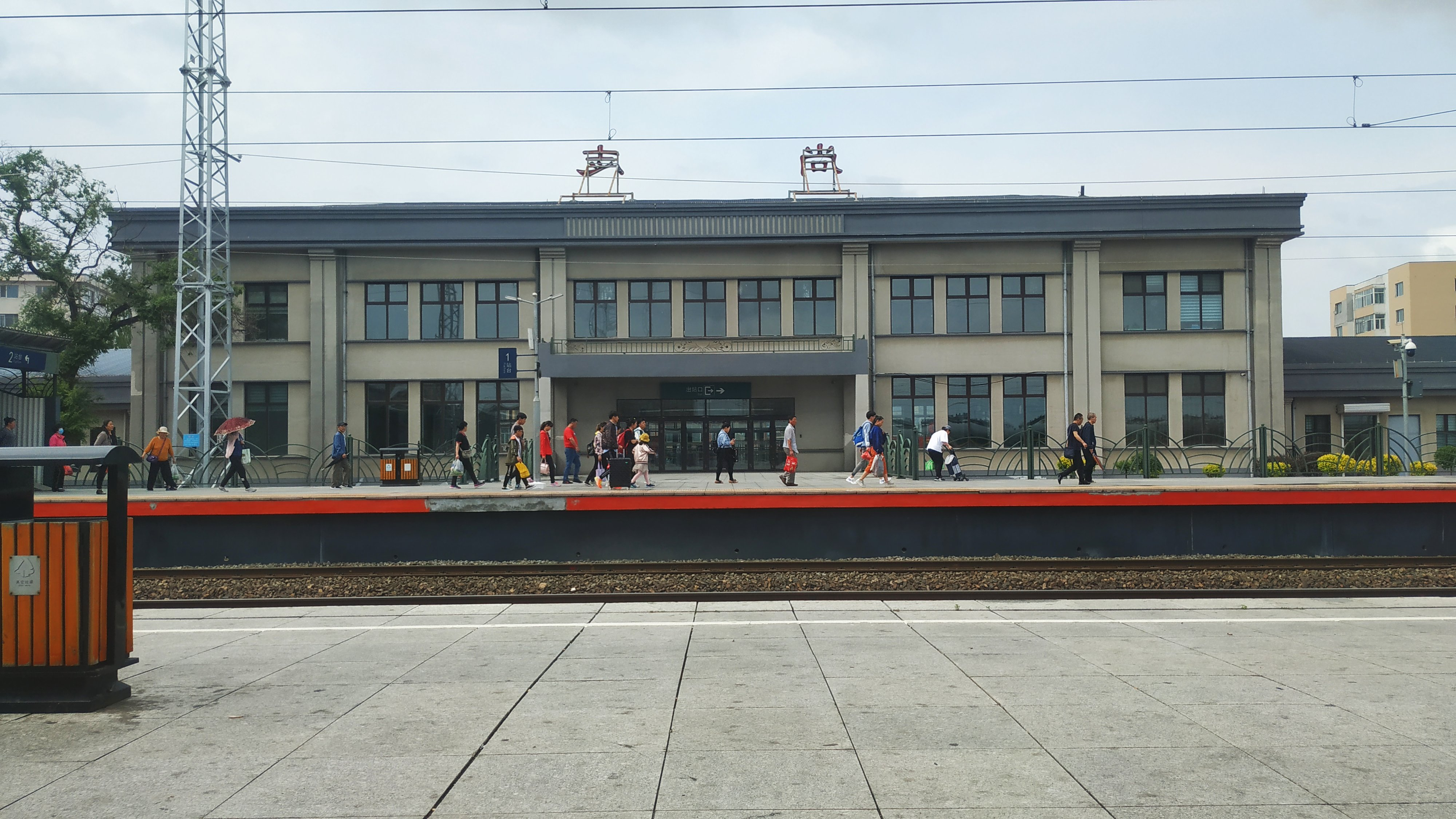 中文（中国大陆）: 哈尔滨市尚志站